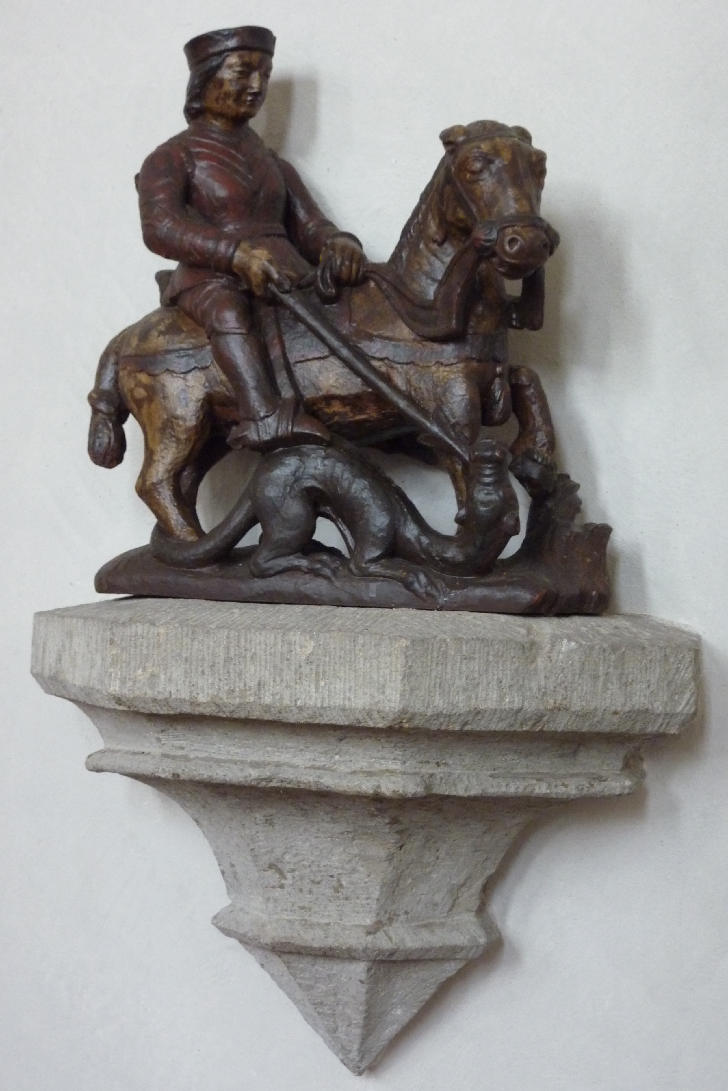 Skulptur des hl. Georg mit Drache in der katholischen Kirche St. Georg in Löhndorf